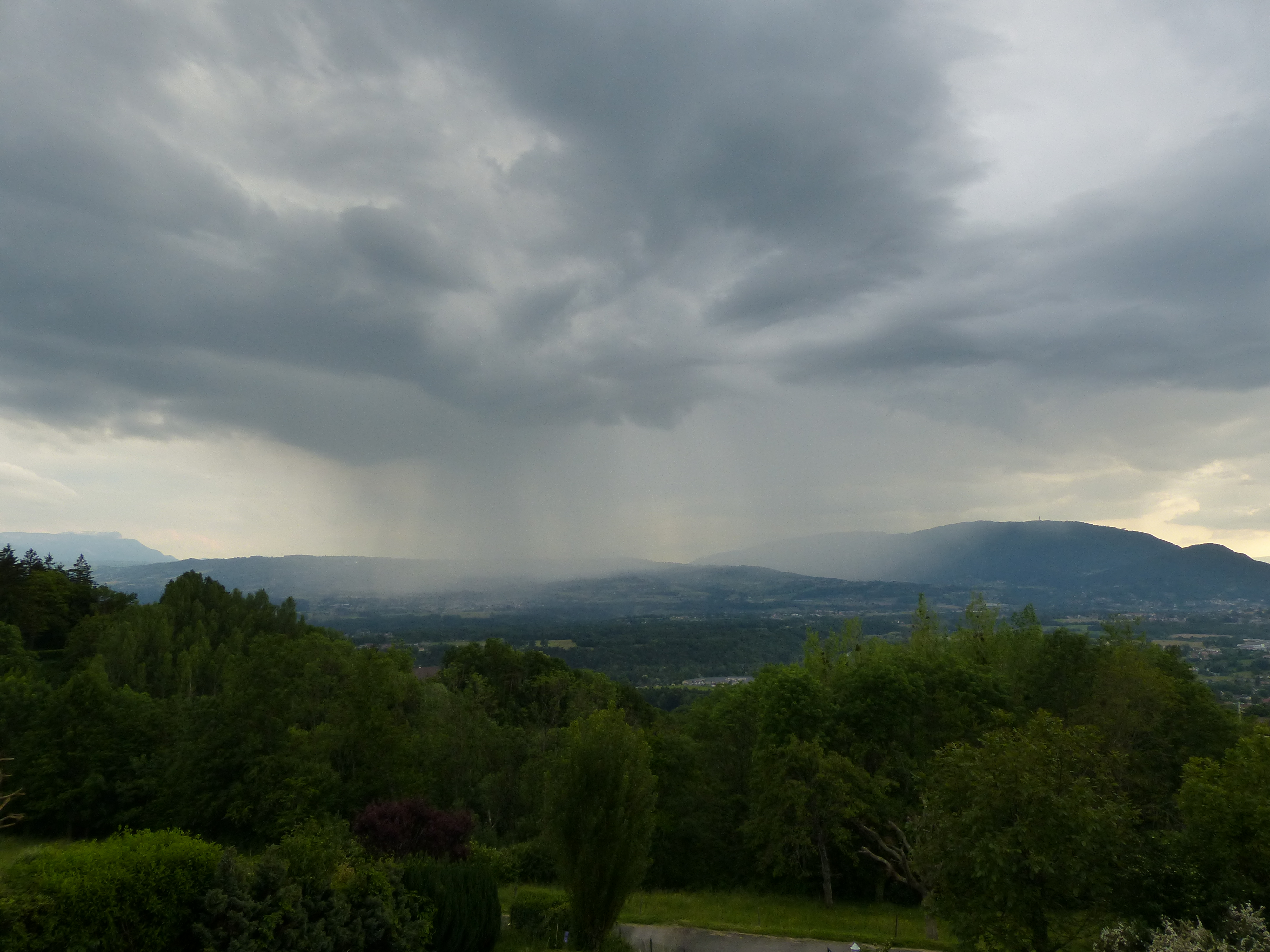 Averse sur Reignier, en Haute-Savoie, France